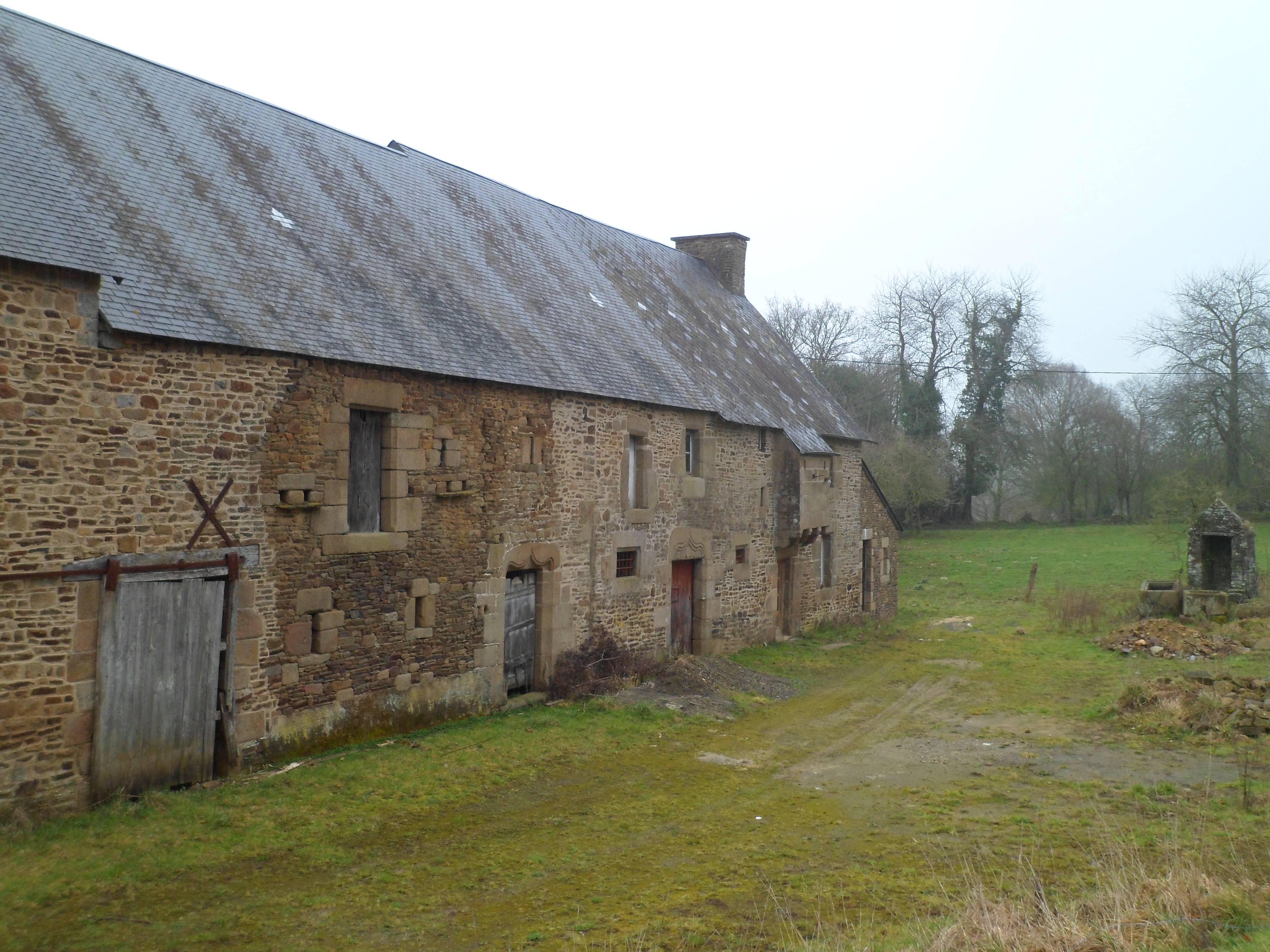 Chapelle et manoir de Carnet